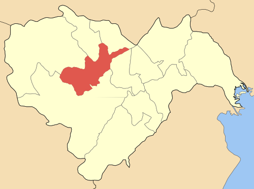 Дем Доврас на картата на Ном Иматия, Гърция. Locator map of Dovra municipality (Δήμος Δόβρα) at Imathias perfecture, Greece.